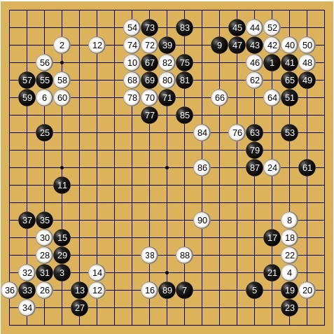 176手 白中押し勝ち